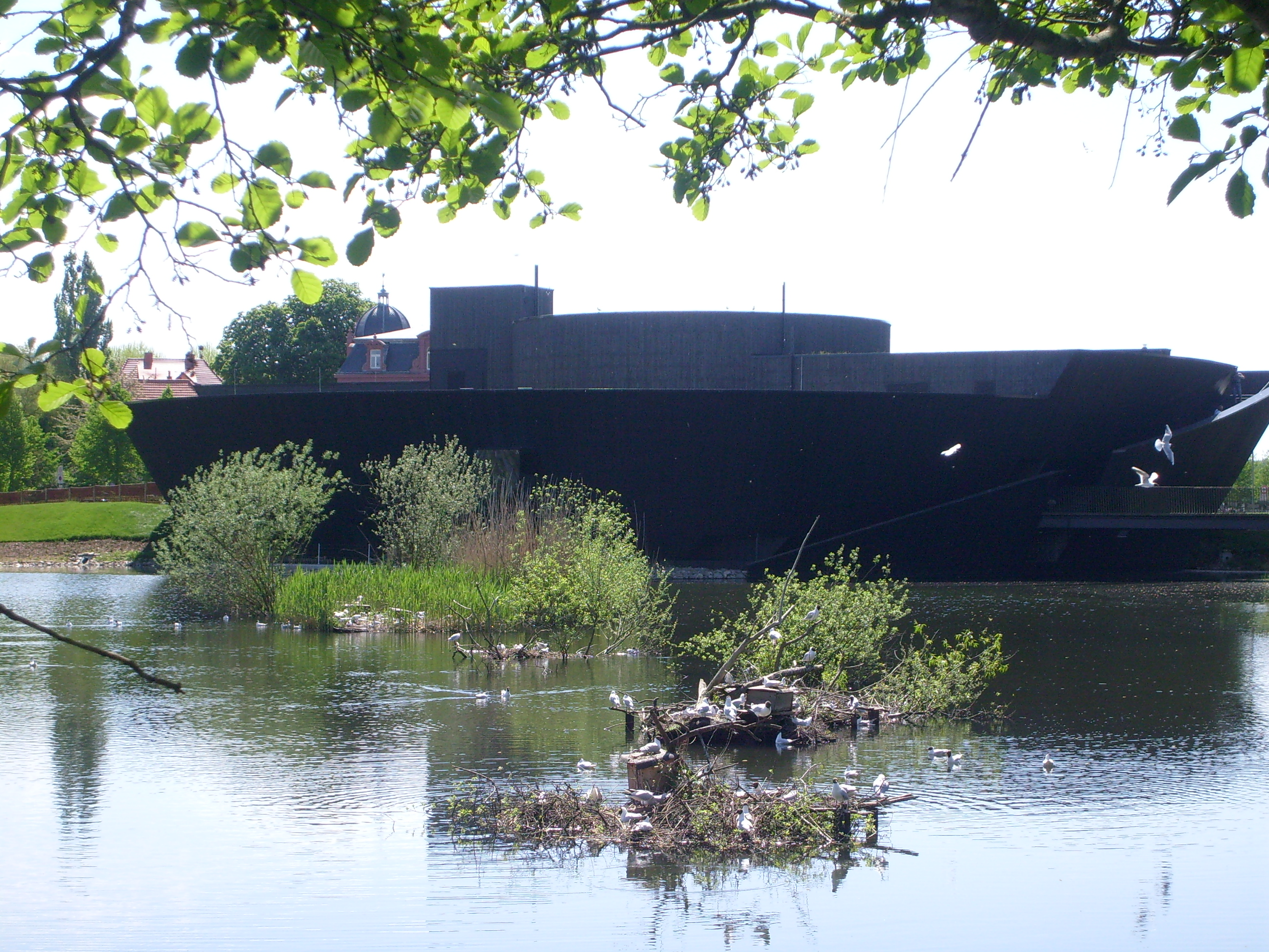 Müritzeum - NaturErlebnisZentrum in Waren Müritz